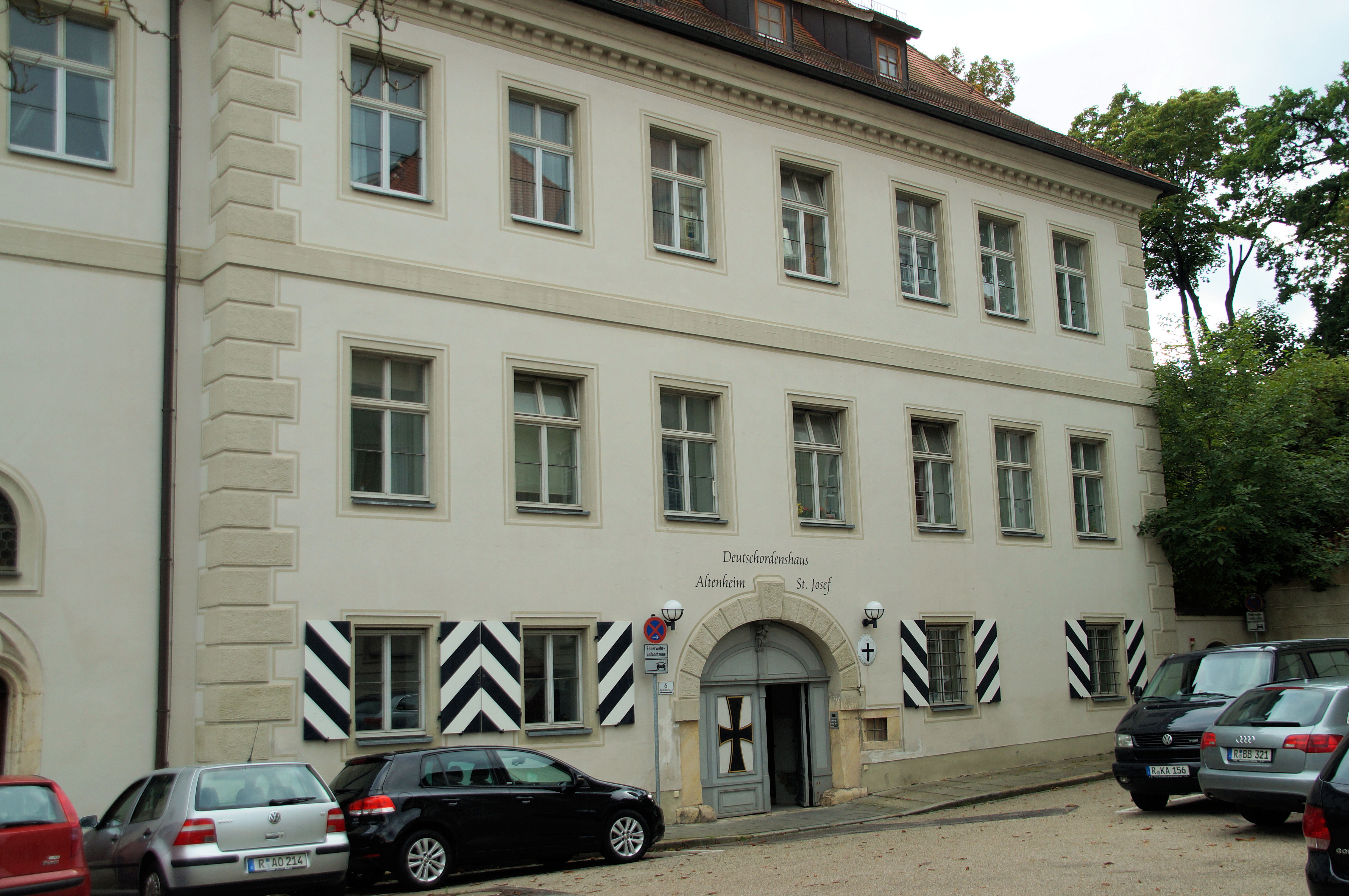 Ehem. Deutschordenskomturei, heute kath. Altenheim St. Josef, vierflügeliger und dreigeschossiger Walmdachbau, 1683 ausgebaut, im Kern um 1397; Inschrifttafel im Hof, Kalkstein, spätgotisch, bez. 1337, früher am Stadtmauerturm ÄgidiengangThis is a photograph of an architectural monument.